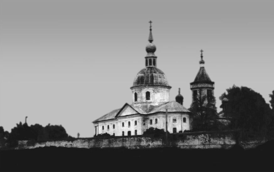 Башкортостан Уфа Успенский монастырь.